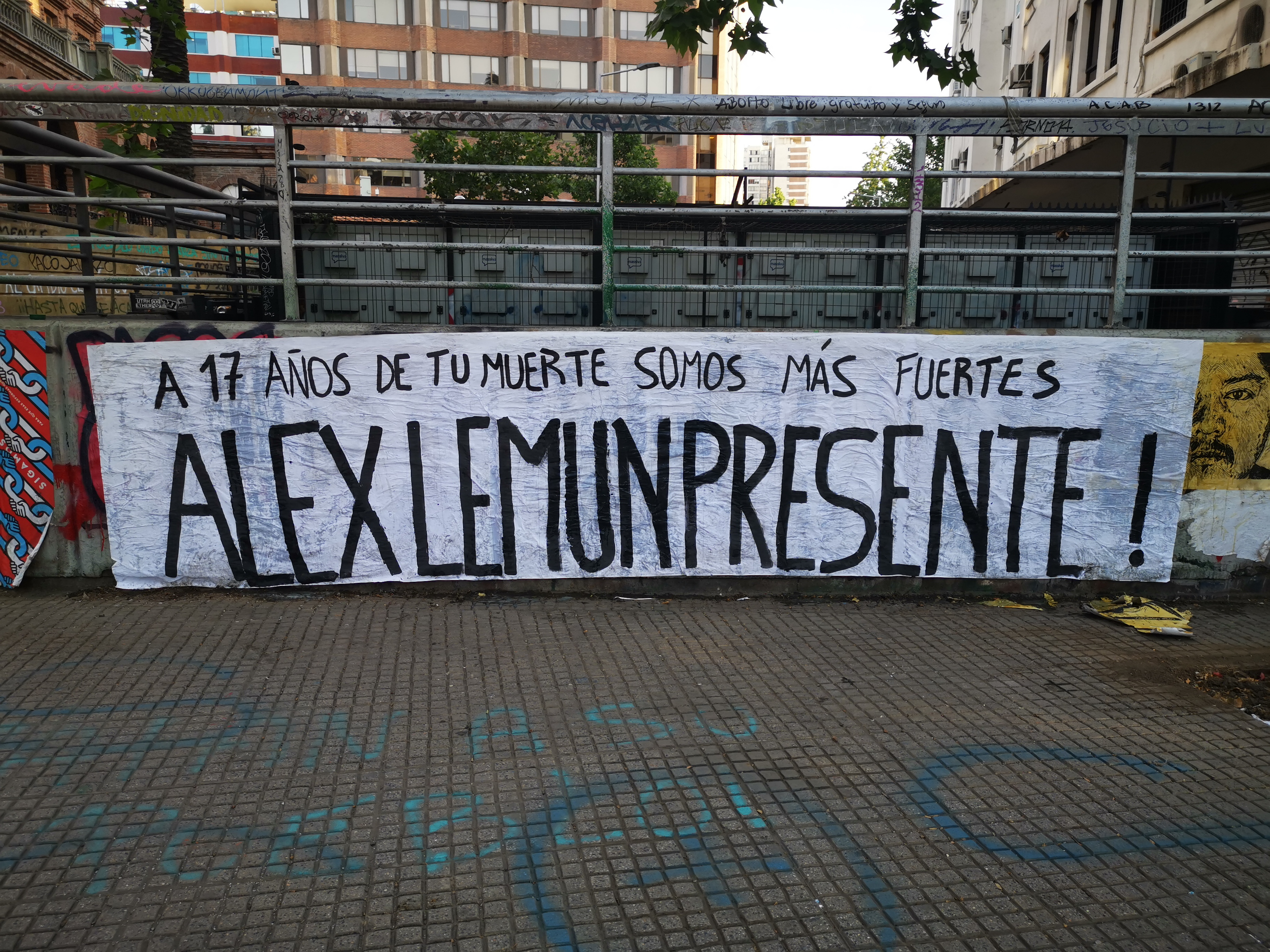 Pancarta en memoria de Álex Lemun, mapuche asesinado en el marco del conflicto mapuche en 2002.